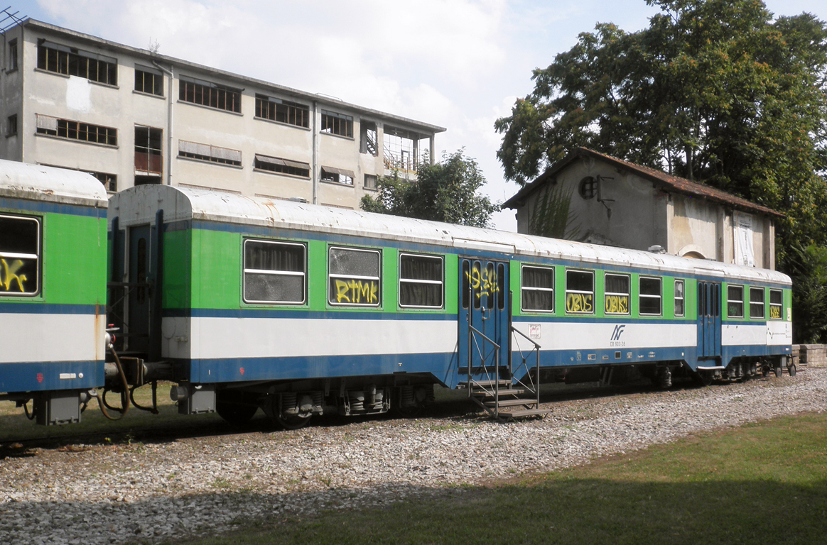 Carrozza EB.900-38 delle Ferrovie Nord Milano, conservata come monumento nell'ex stazione ferroviaria di Castiglione Olona.